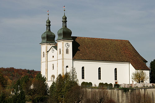 Kirche St.German in Seewen (SO)